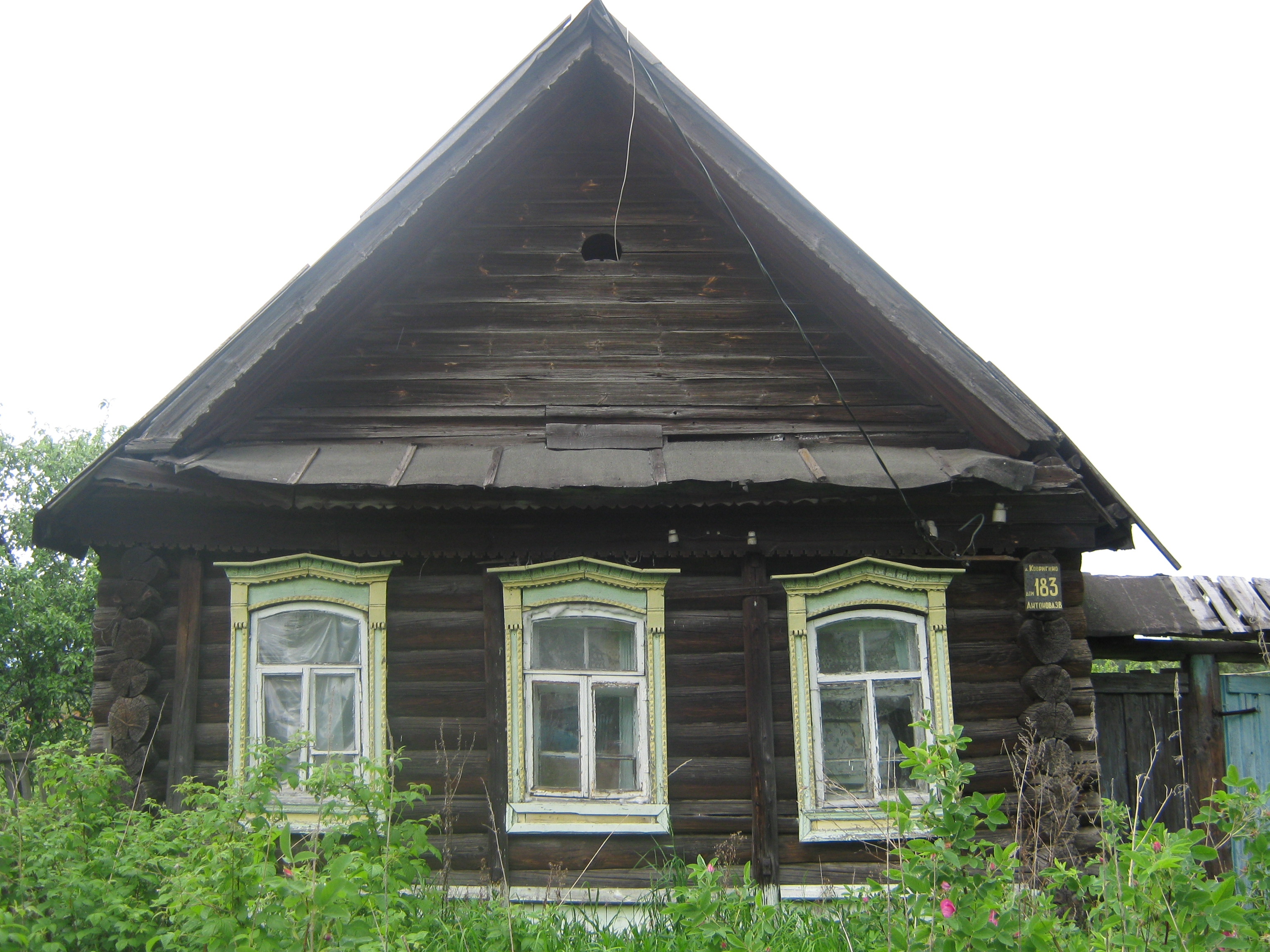 Дом № 183 в деревне Ковригино Павлово-Посадского района.